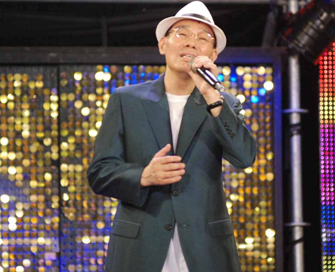 陳雷出席三立電視綜藝節目《超級夜總會》錄影。